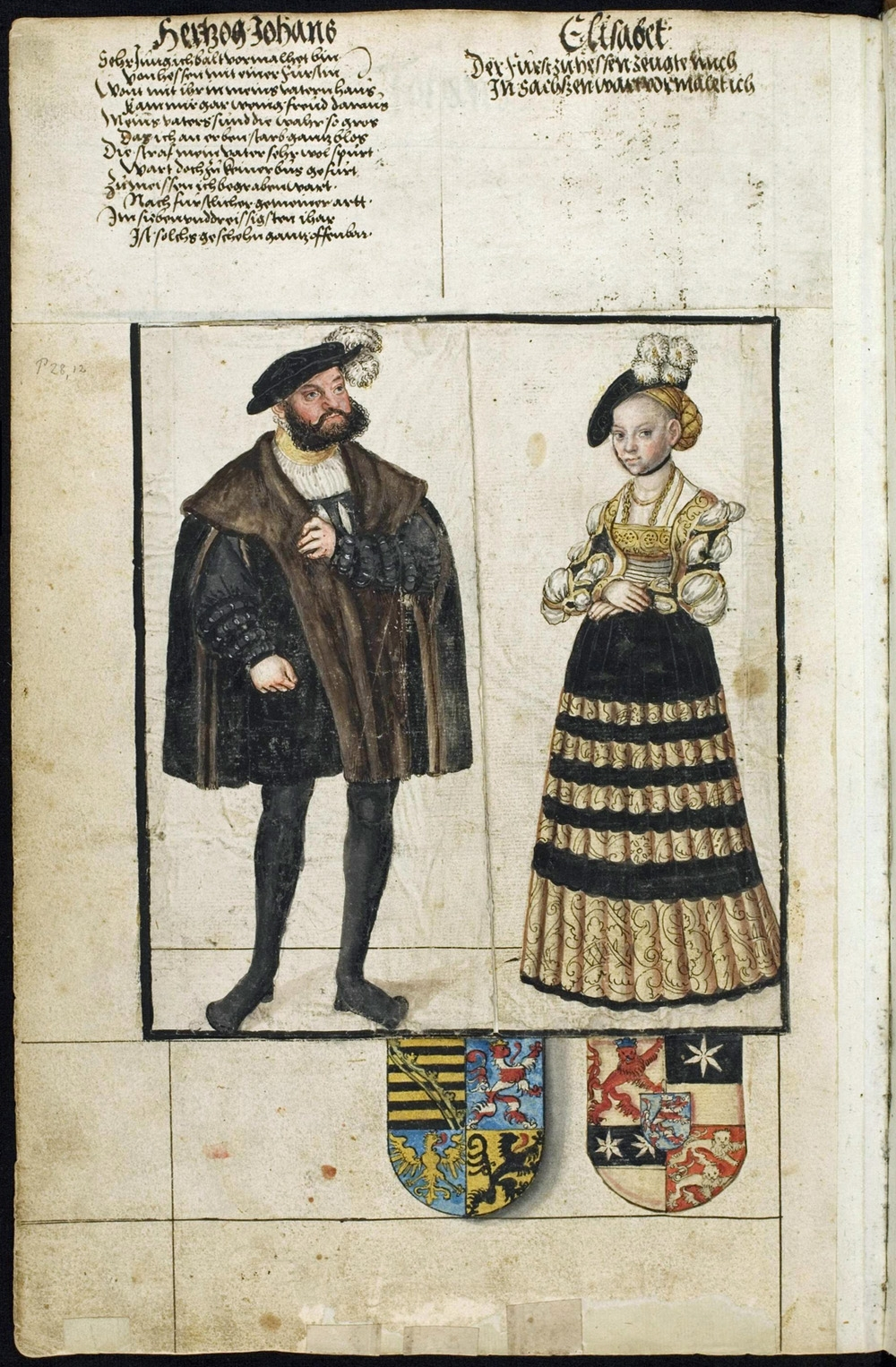 Johann und Elisabeth im "Sächsischen Stammbuch" von 1546 Über der Elisabethfigur ist zu lesen: Der Furst zu Hessen zeugte mich In Sachßen wont vormalet ich. Über Johann steht: Sehr Jung ich balt vormalhet bin von Hessen mit einer Furstin Wont mit ihr in meins vatern haus Kam mir gar wenig freud daraus Meins vaters sund die wahr so gros das ich an erben starb gantz blos Die straf mein vater sehr wol spürt wart doch zu keiner bus gefurt Zu meissen ich begraben wart nach furstlicher gemeiner artt. Im siebenunddreissigsten ihar Ist solchs geschehn gantz offenbar.